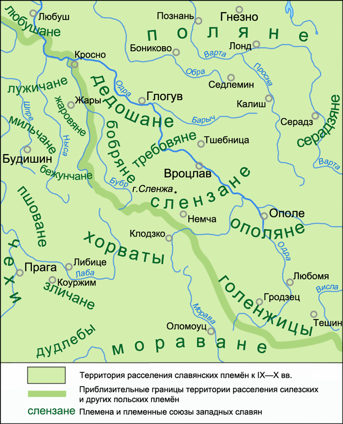 Карта размещения славянских племён в Силезии и на соседних территориях в IX—X вв. Источник: Карта размещения племенных диалектов западных славян в 800—950 гг. . Heiliges Römisches Reich 1000